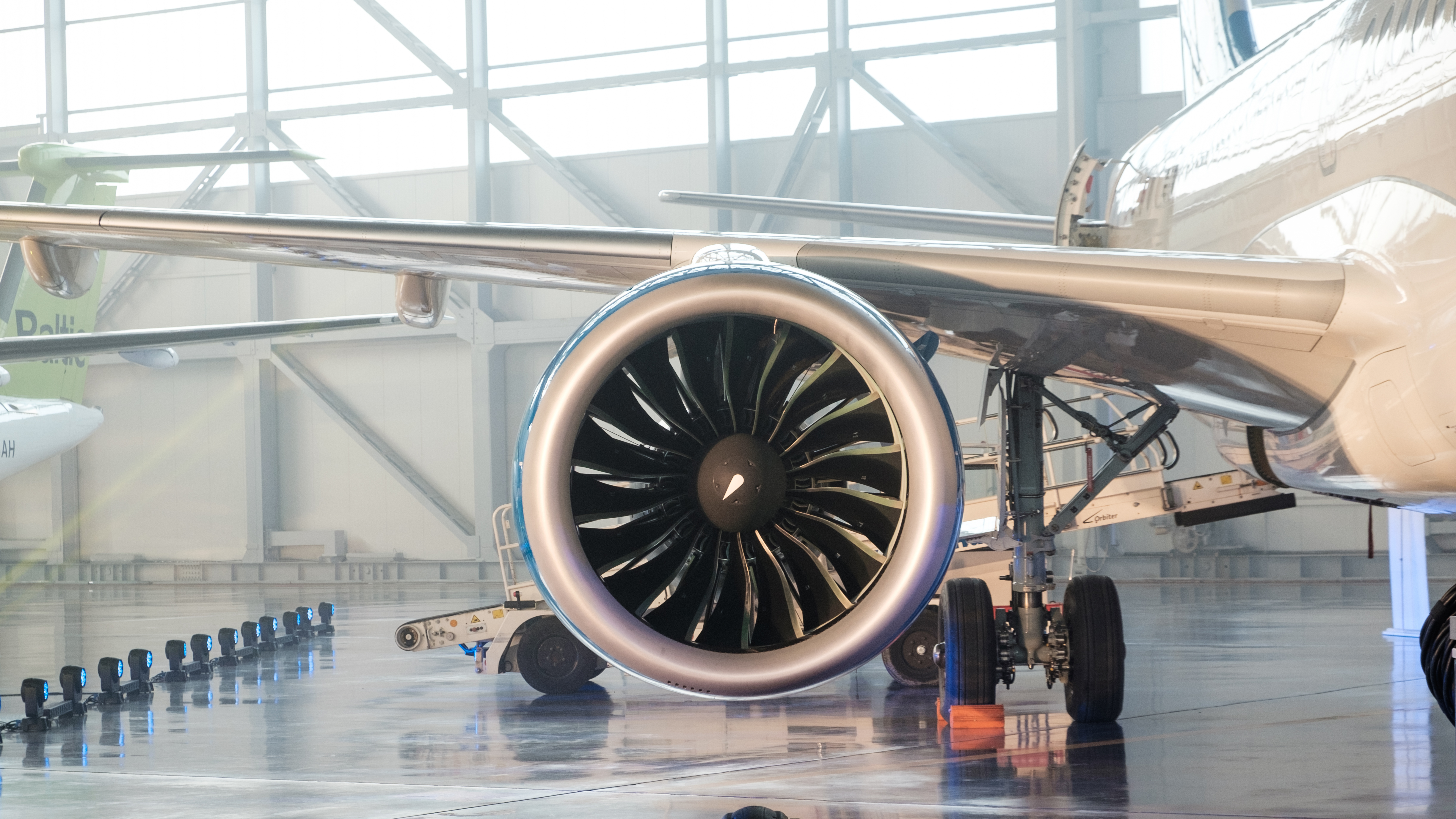 Bombardier CS100